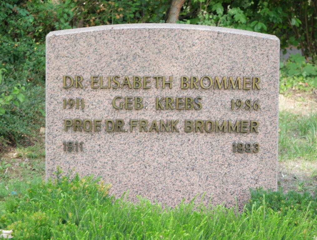 Grab des Archäologen Frank Brommer, 1911-1993, auf dem Hauptfriedhof Mainz